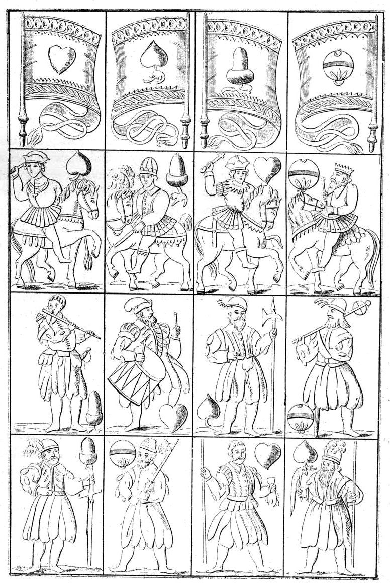 Ilustracja Encyklopedii staropolskiej T.3 025 - Karty polskie z XVI wieku